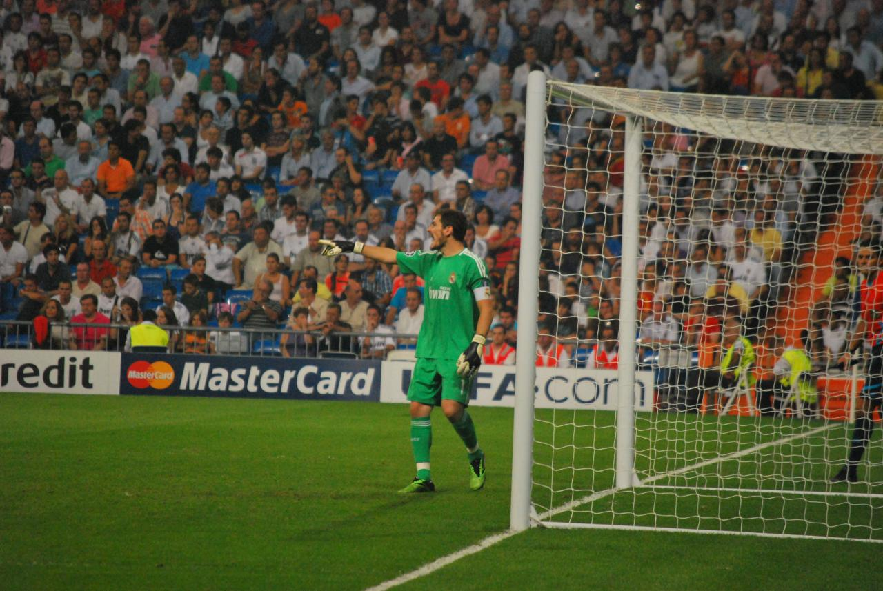 Primer partido de la Champions Legue Real Madrid 2 - Ajax 0 15 septiembre 2010